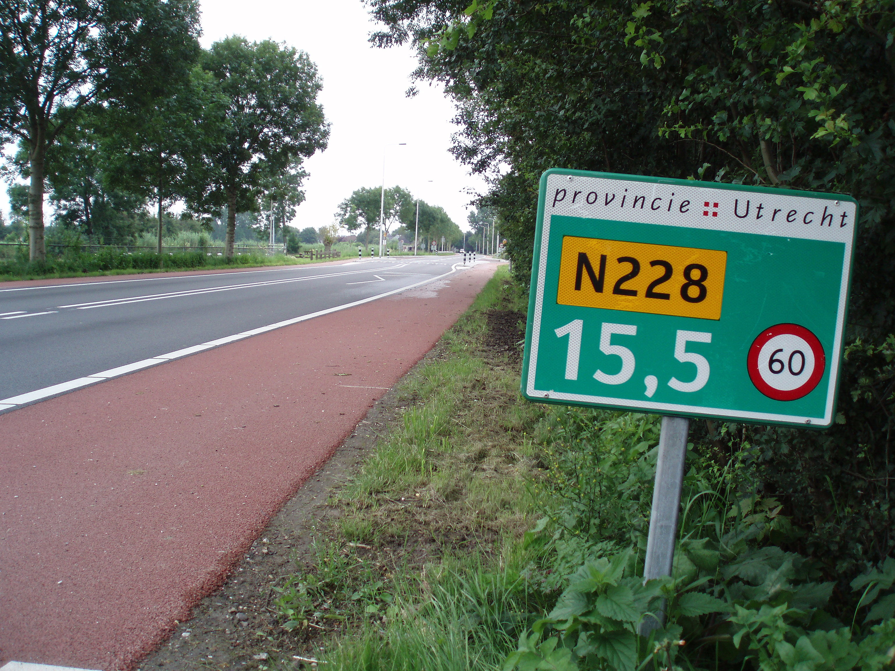 De N228 ter hoogte van Willeskop.